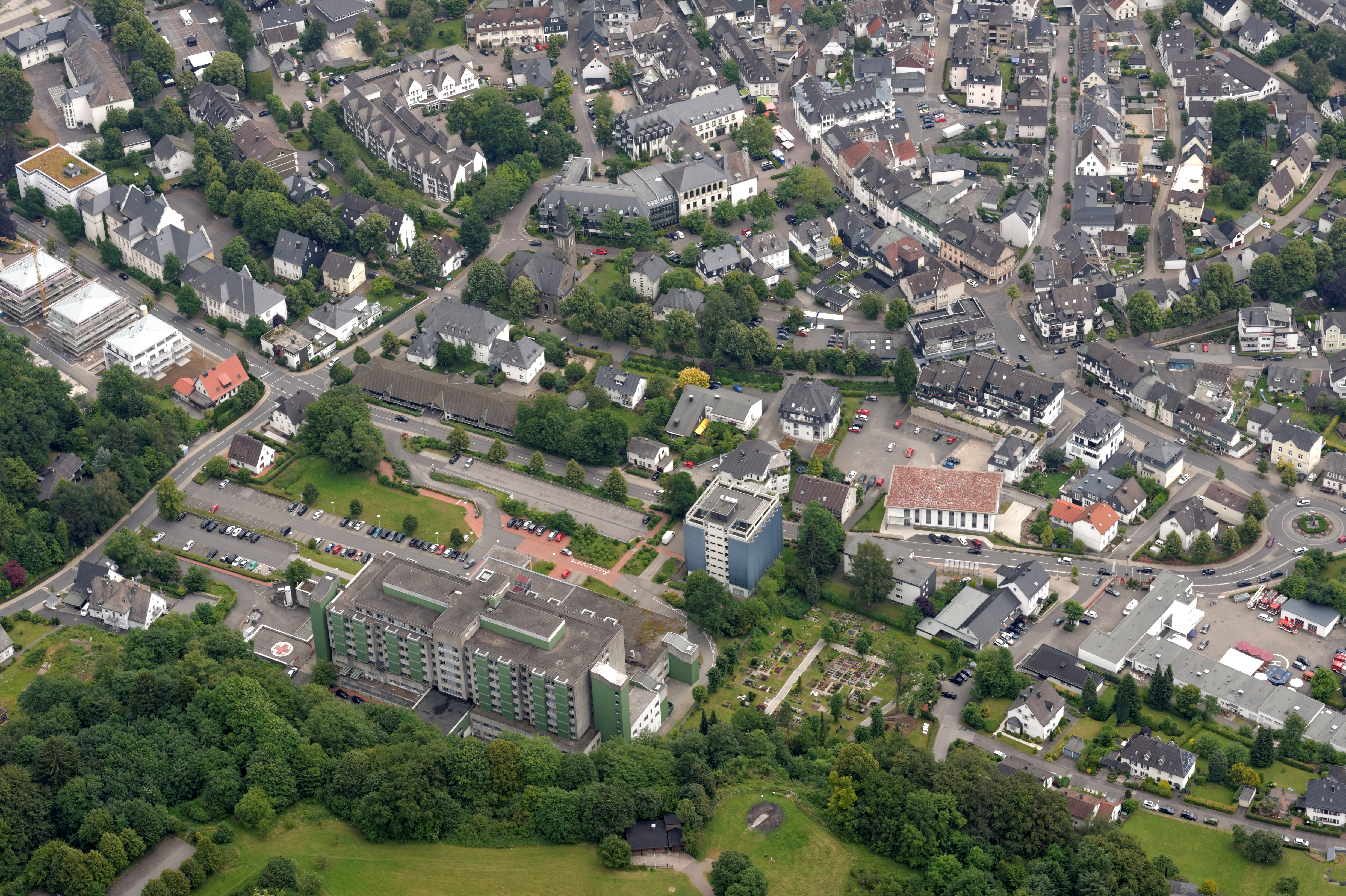 Fotoflug Sauerland Nord. Attendorn, Krankenhaus St. Barbara The making of this document was supported by the Community-Budget of Wikimedia Germany.